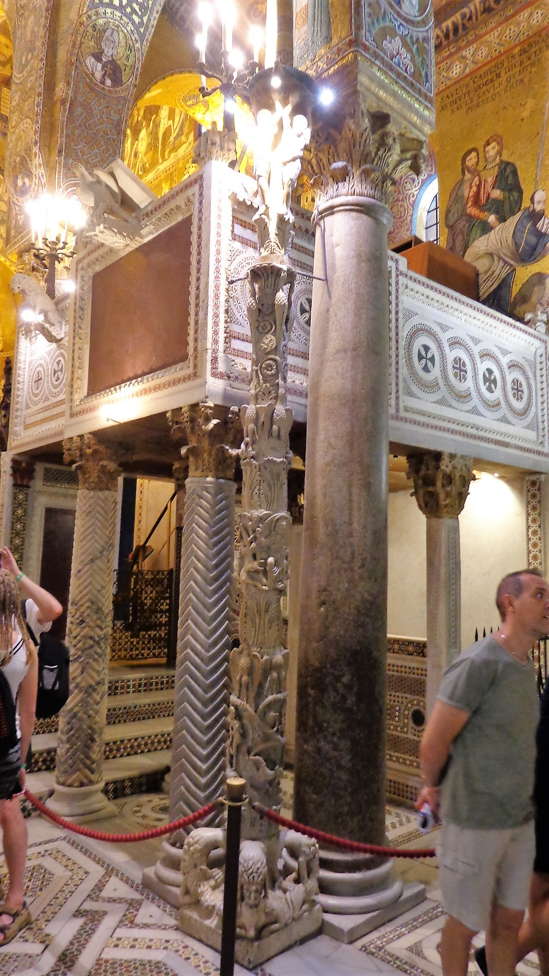 Ambone, candelabro e mosaici cosmateschi.